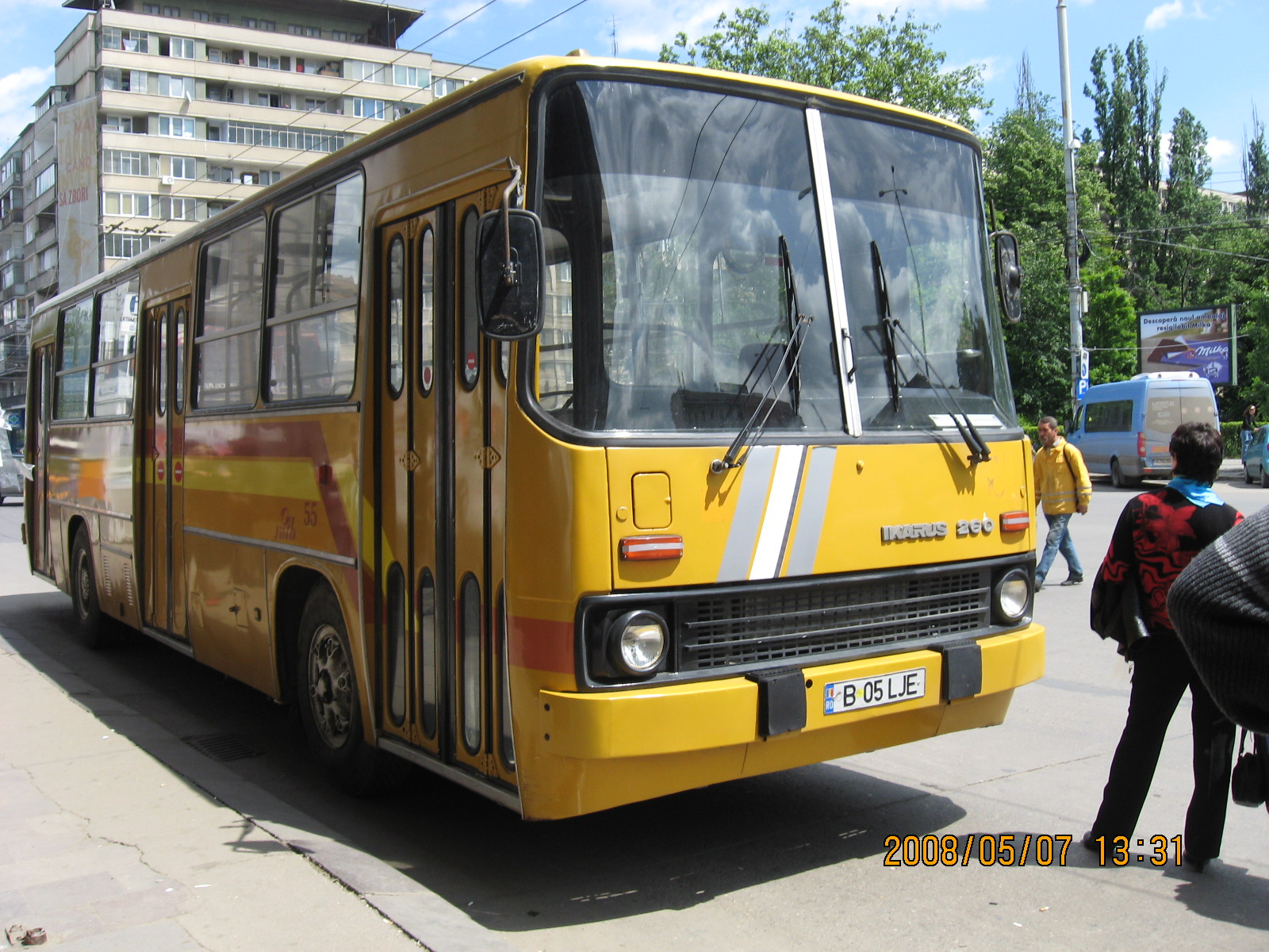 Autobuz RATB Ikarus 260 #55 (adaptat pt. persoane cu dizabilități)